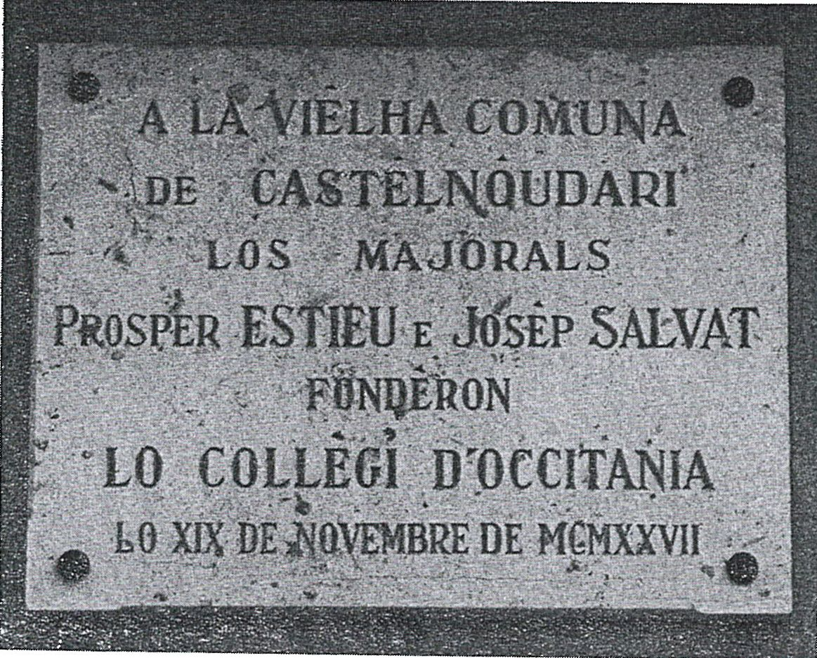 Photographie de la plaque commémorative de la création du Collège d'Occitanie à Castelnaudary